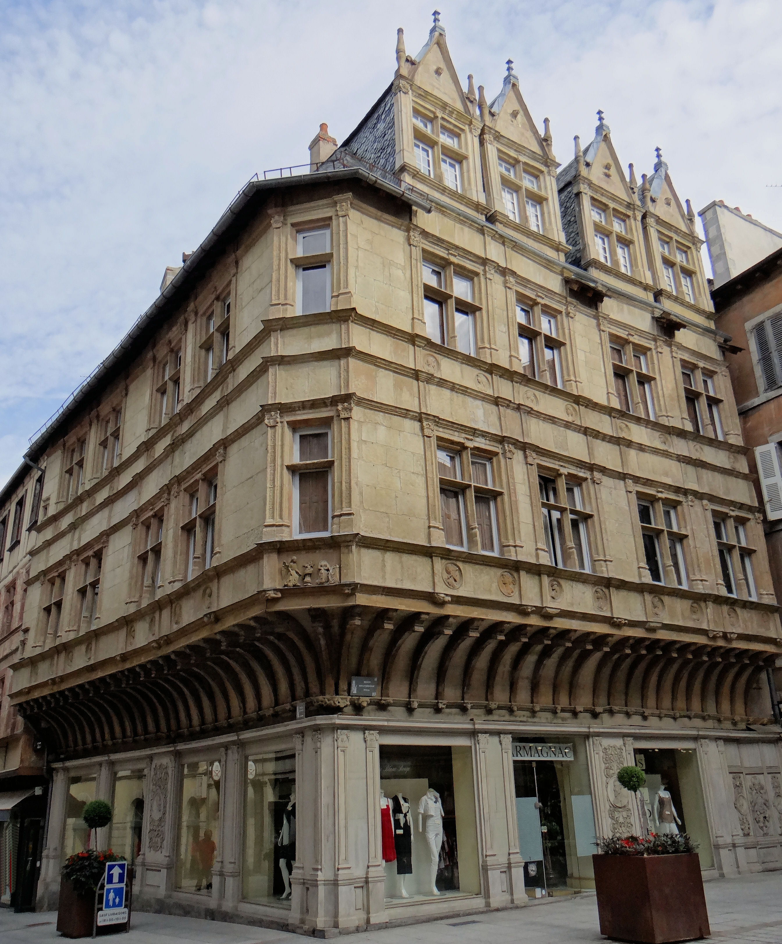 Rodez - Maison d'Armagnac à l'angle de la place de l'Olmet et de la rue 'Armagnac